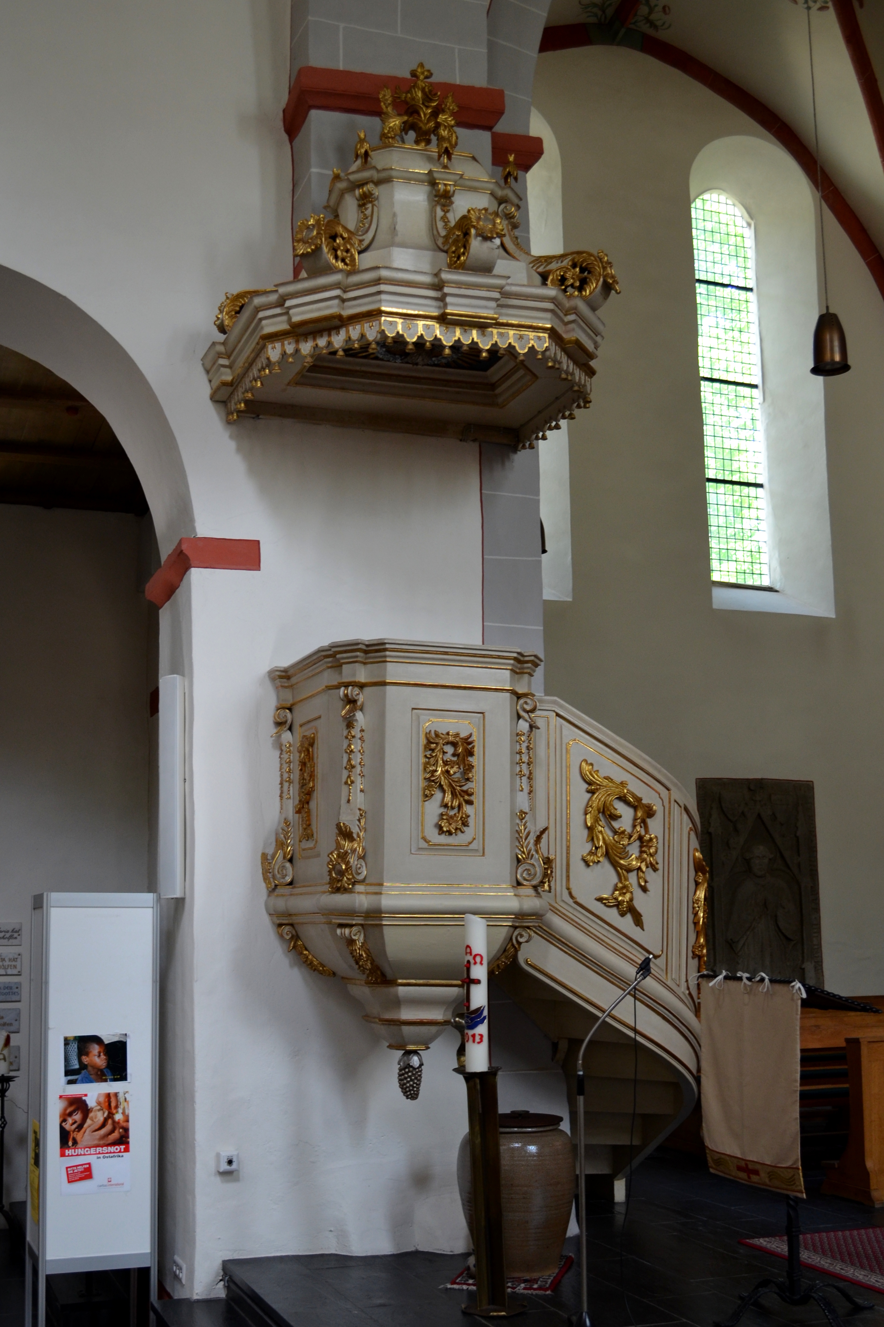 Boppard-Hirzenach Bartholomeüskerk